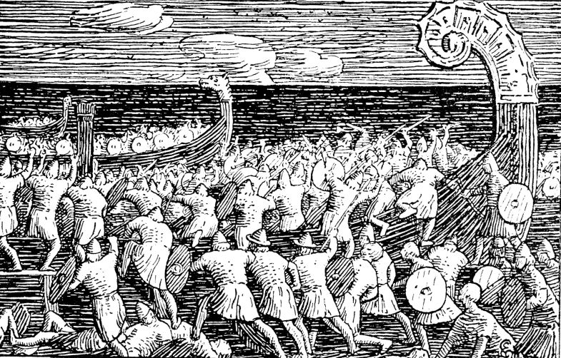 Halfdan Egedius: Illustration for Olav Trygvasons saga. Snorre 1899-edition. «Eriks Mænd gaar op paa Ormen lange.» nb: «Eriks menn går opp på Ormen lange.» nn: «Mennene til Eirik går opp på Ormen lange.»